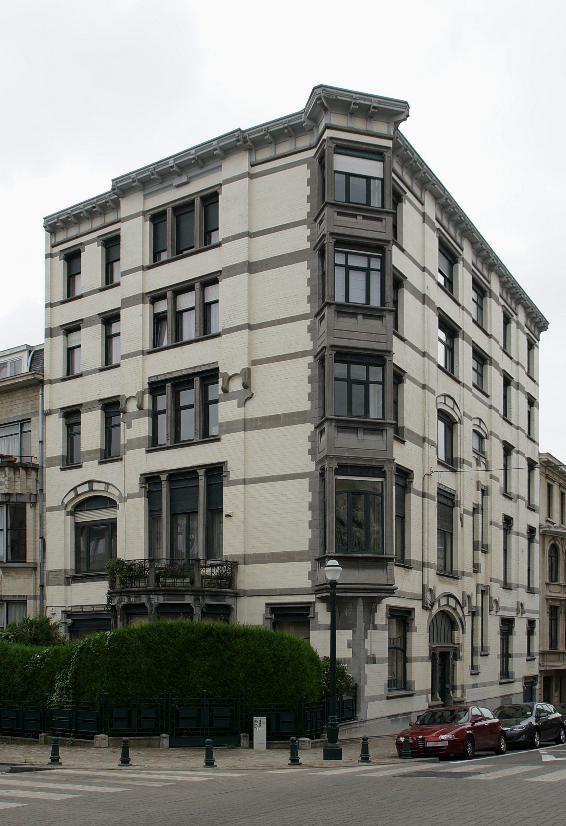 Elsene, Vilain XIIII-straat 17a (Florale Art nouveau) (1903-1905). Oeuvre van architect Ernest Delune.